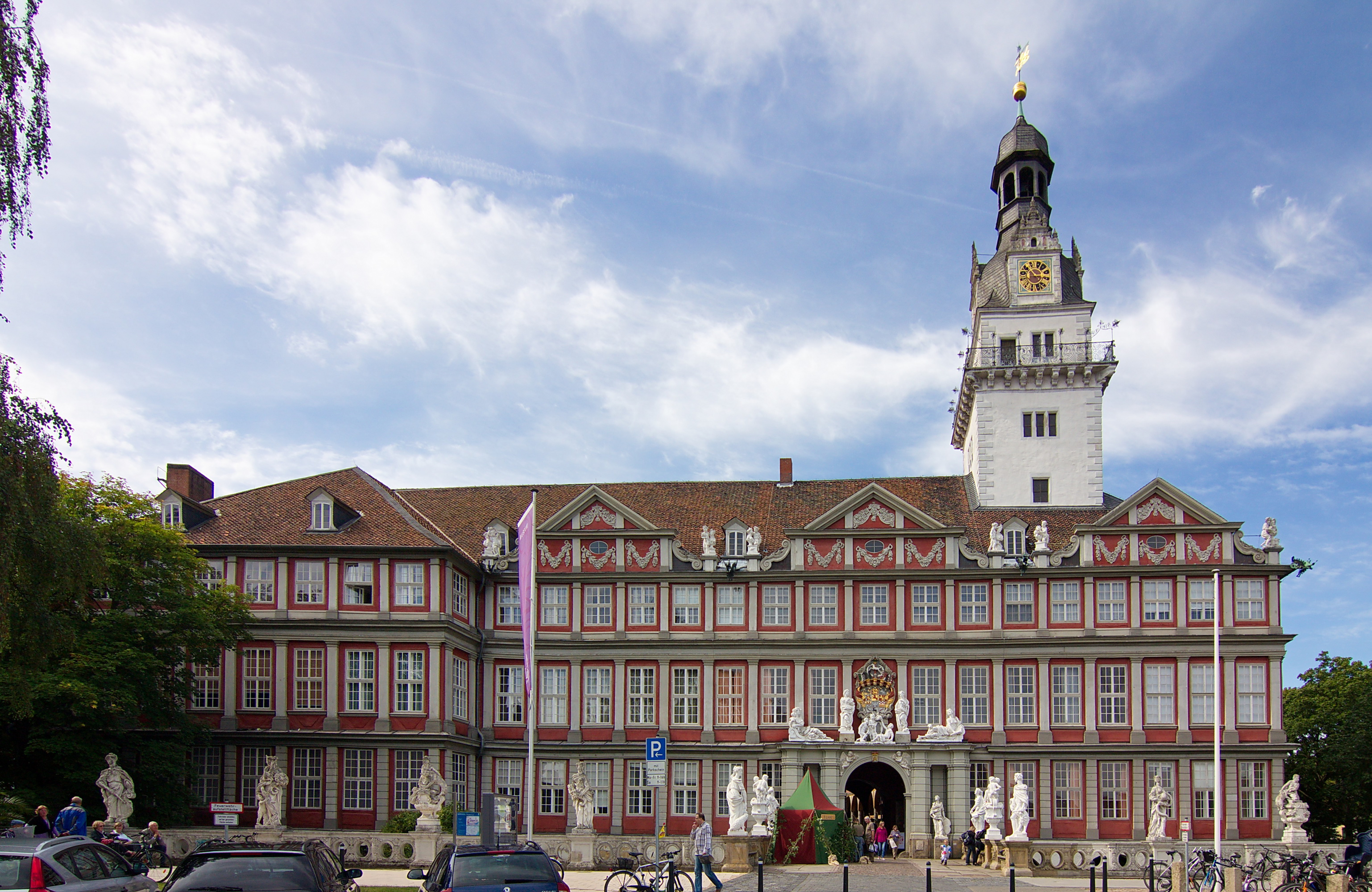 Schloss Wolfenbüttel von 1238 in Wolfenbüttel, Niedersachsen, Deutschland.